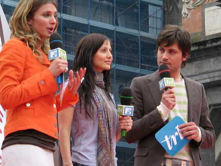 Napoli, Piazza Dante, it:25 aprile it:2005 Federico Russo e Carolina Di Domenico, VJ di MTV, conducono Total Request Live in diretta con ospite Natalie Imbruglia Autore/Fonte: Secretkeeper81 È una foto scattata da me stessa dal vivo. Madda 03:10, 26 apr 2006 (CEST)